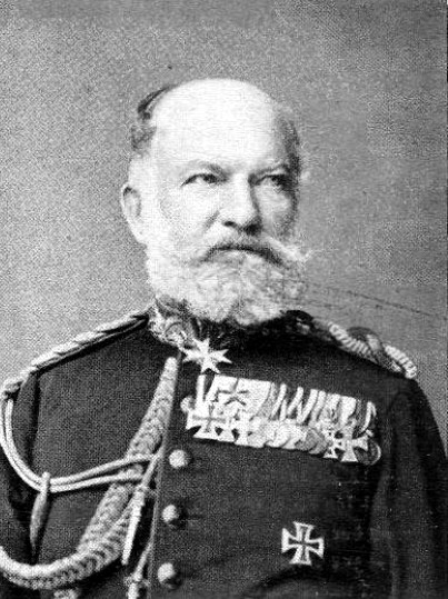 Generallieutenant v. Conta